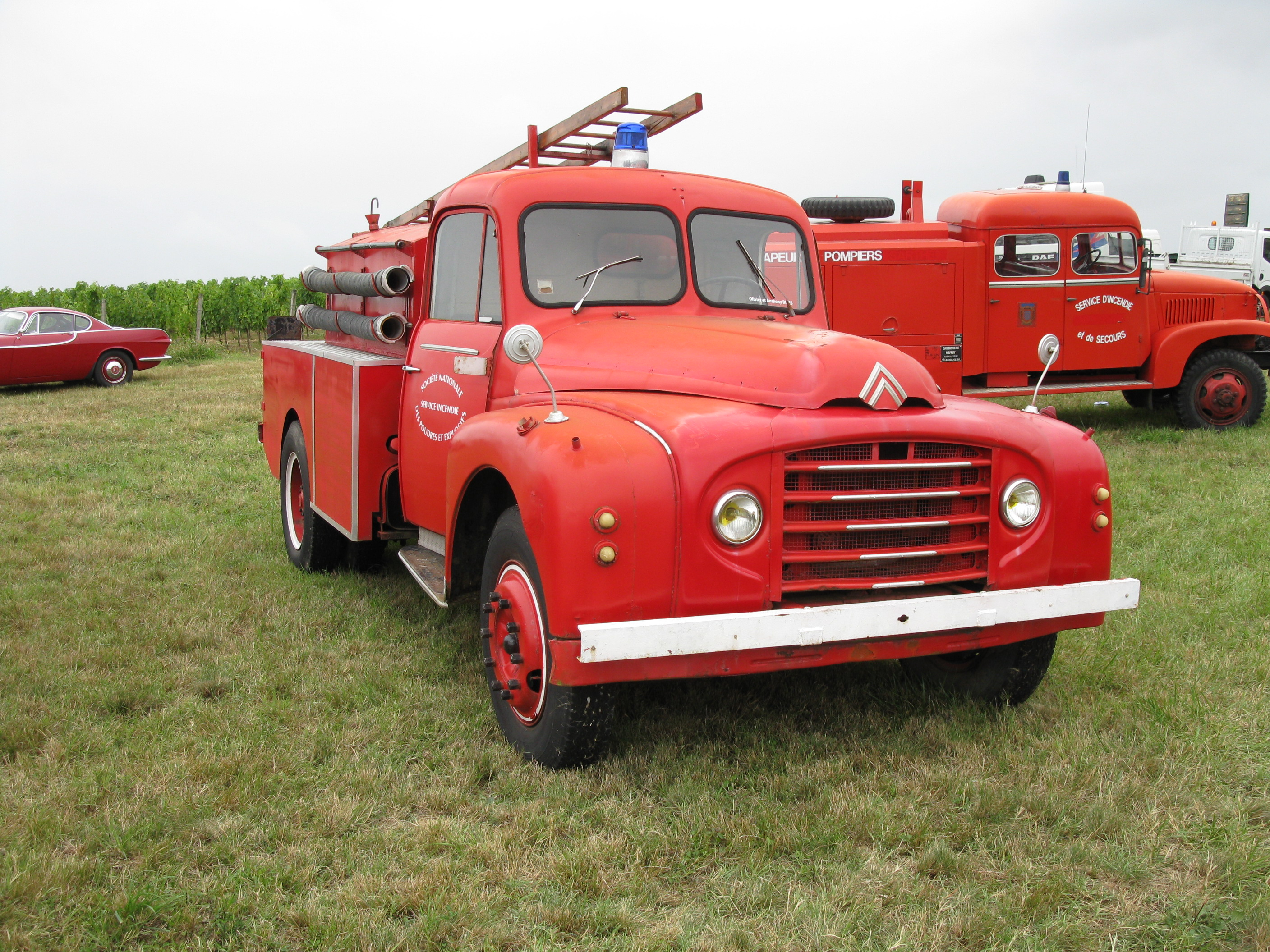 Camion Citroën Type 55 du Service incendie de la société nationale des poudres et explosifs.